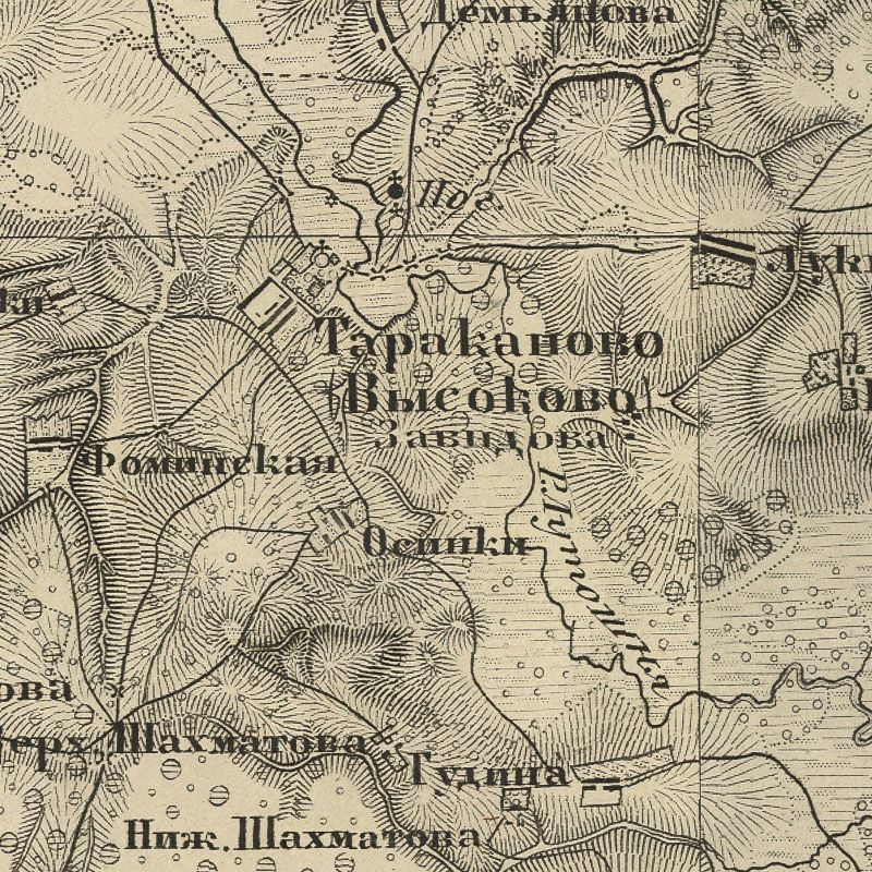 Деревня Тараканово Солнечногорского района Московской области России на карте Ф. Ф. Шуберта